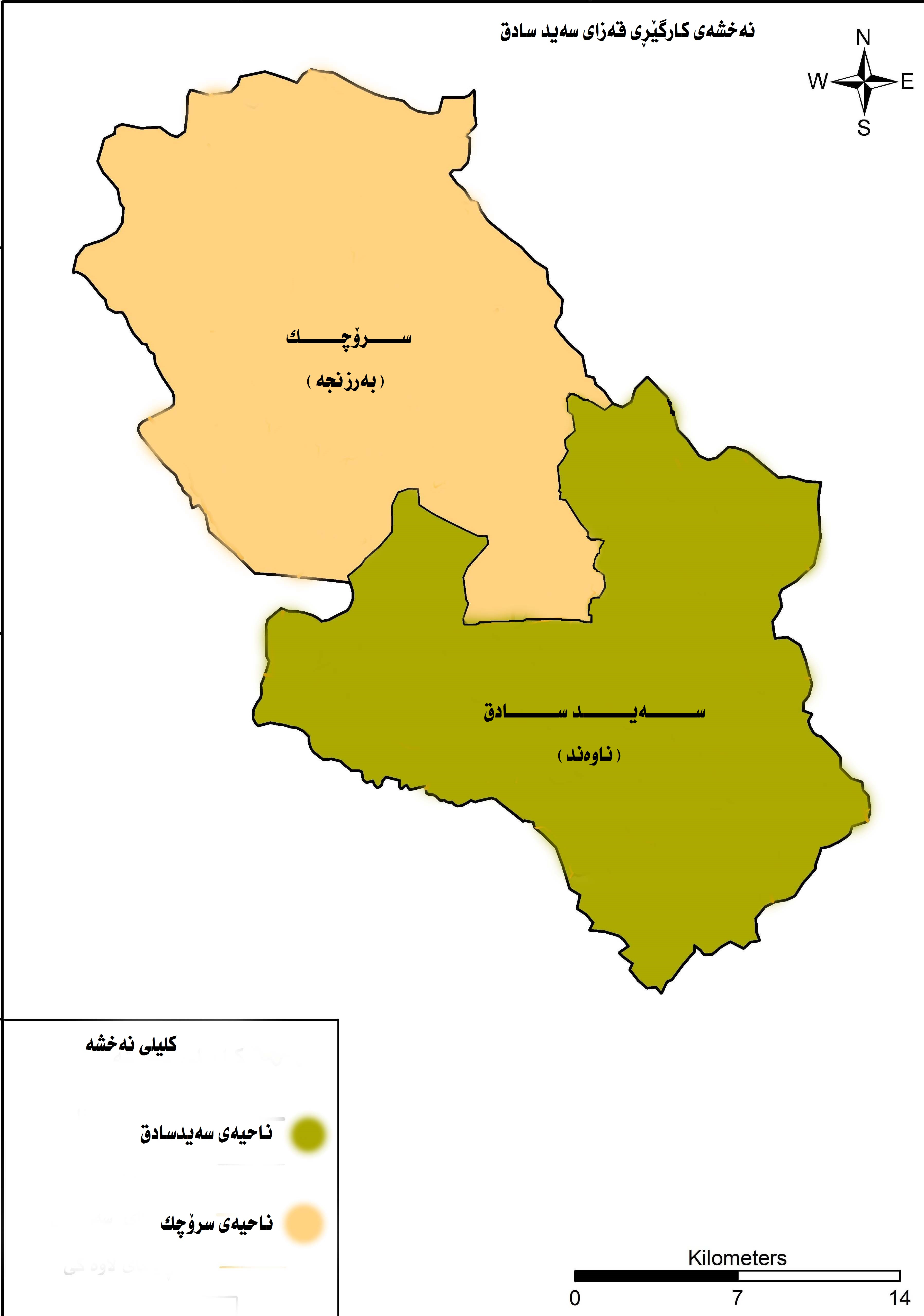 کوردی: نەخشەی کارگێڕی قەزای سەیدسادق